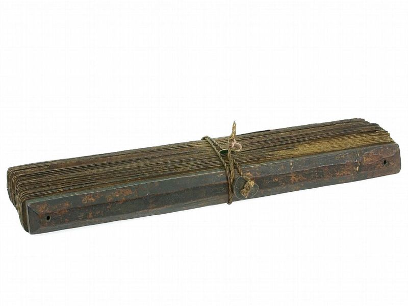 Lontarhandschrift. Verhaal van Yusup in het Oost-Javaans op 115 vellen lontarblad, met houten schutbladen